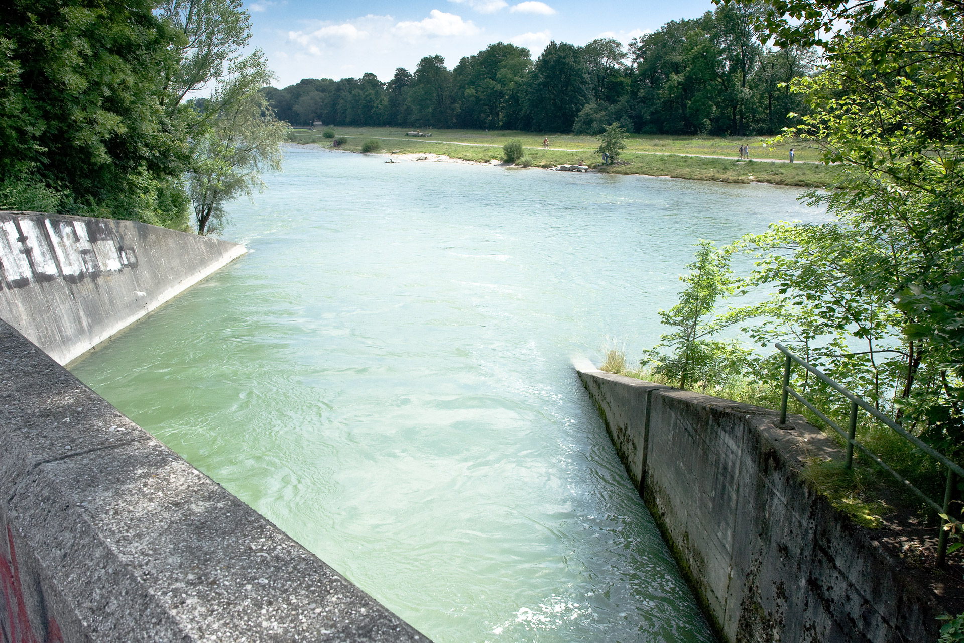 Ausleitung des Isar-Werkanals